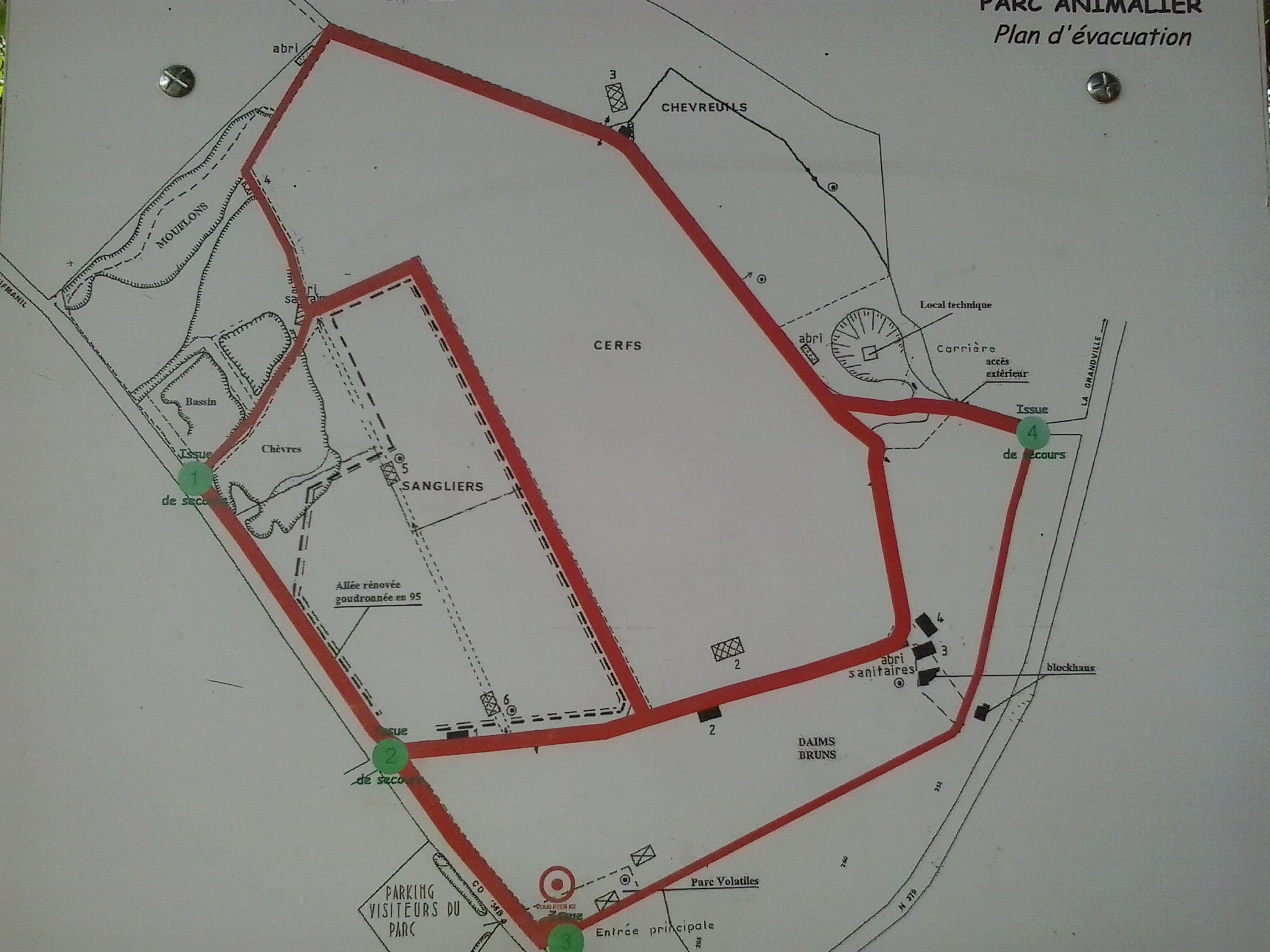 Les Circuits : Parc animalier de Saint-Laurent est une réserve naturelle peuplée d'animaux sauvages, située entre Aiglemont et de Saint-Laurent, à proximité de Charleville-Mézières dans le département des Ardennes